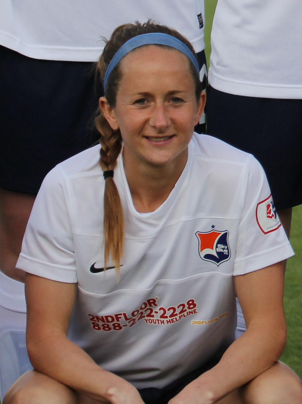 Manya Makoski (Sky Blue FC)